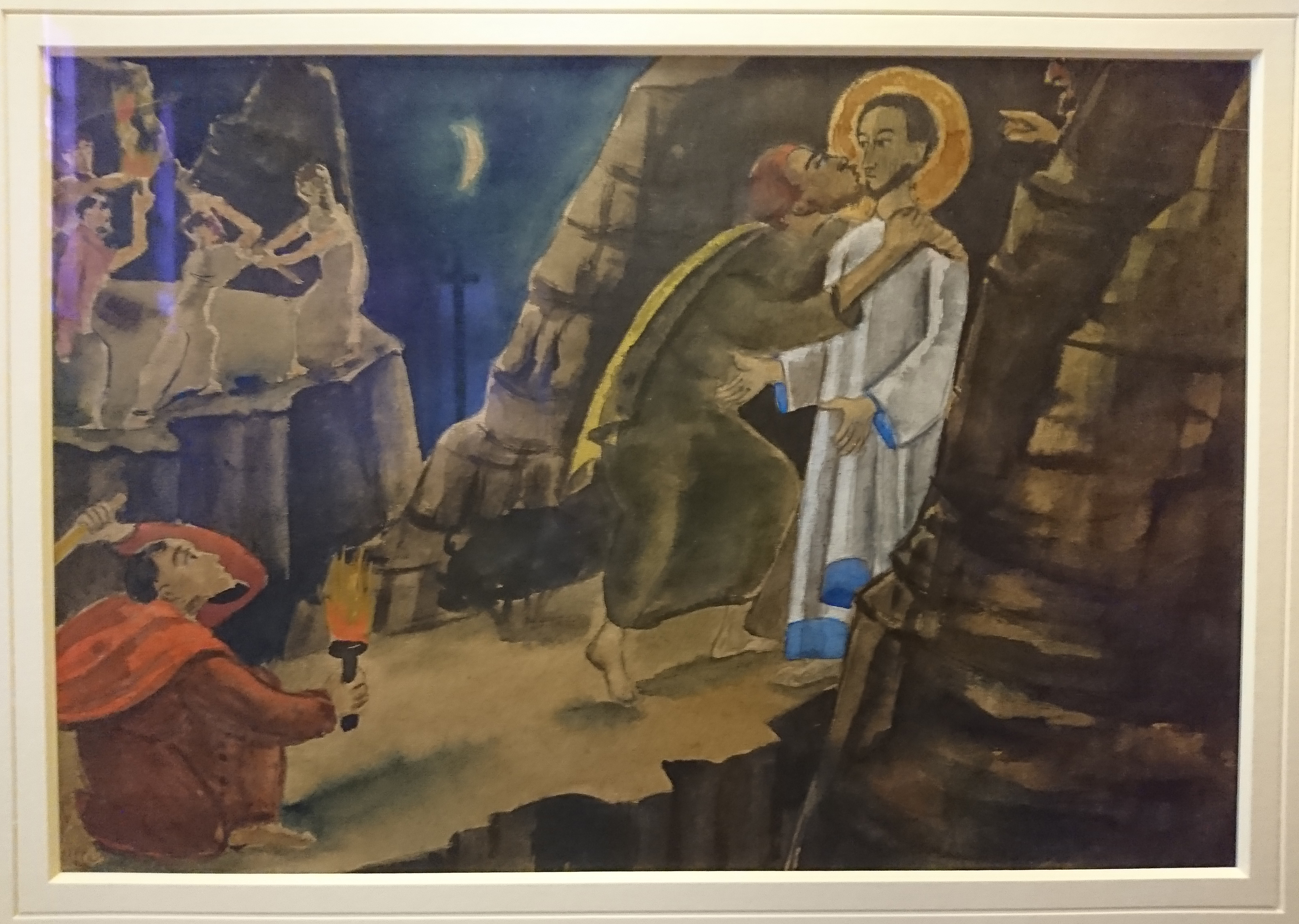 Anita Rée, Verhaftung in Gethsemane (auch Judaskuss), 1930, Entwurf zu einem Teil des abgelehnten Altar-Triptychons der Ansgarkirche in Hamburg-Langenhorn. Anita Rée (1885–1933) Alternative names Anita ReeDescriptionGerman painterDate of birth/death 9 February 1885 12 December 1933Location of birth/death Hamburg Kampen/SyltWork location HamburgAuthority control : Q274026 VIAF: 807699 ISNI: 0000 0000 6674 4388 ULAN: 500056250 LCCN: n86123739 Open Library: OL5484054A WorldCat creator QS:P170,Q274026 (Links oben sind leider zwei senkrechte, bläuliche Lichtreflektionen zu sehen)